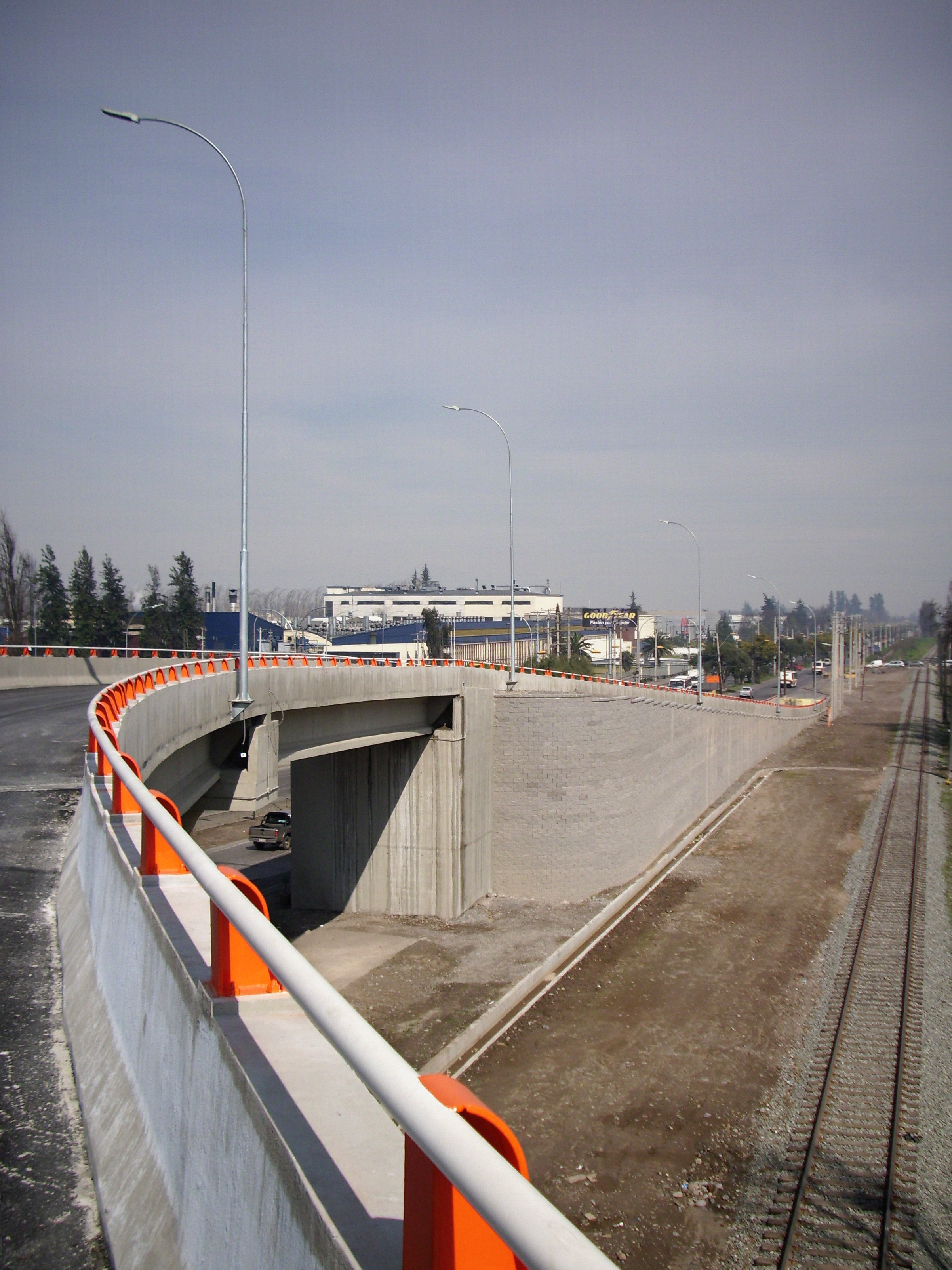 El cruce de las avenidas Pajaritos y Camino a Melipilla en la comuna de Maipú, en Santiago de Chile. Fotografía tomada el 25 de agosto de 2009, cuando aún no estaba abierta al tránsito.